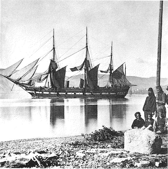 Die Schraubenkorvette "Erzherzog Friedrich" vor der dalmatischen Küste 1868. Sie lief damals zu einer zweijährigen Ostasienreise aus. Zwei Jahre vorher hatte sie an der Schlacht von Lissa teilgenommen.